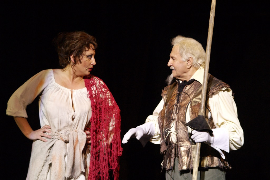 Мюзикл Центрального академического театра Российской армии «Человек из Ламанчи» по роману Сервантеса «Дон Кихот» был поставлен к 90-летию артиста Владимира Зельдина